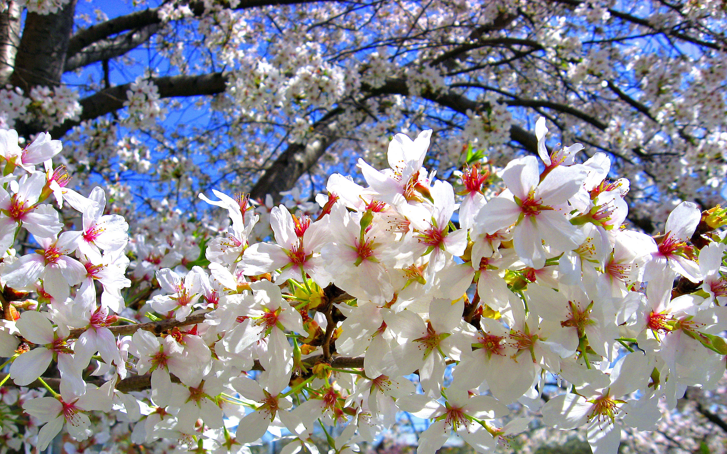 Sakura